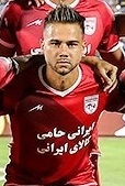 دیدار تیم‌های فوتبال استقلال تهران و تراکتورسازی تبریز در استادیوم آزادی تهران برگزار شد که در این دیدار تیم استقلال با نتیجه ۳ بر صفر حریف خود را شکست داد.